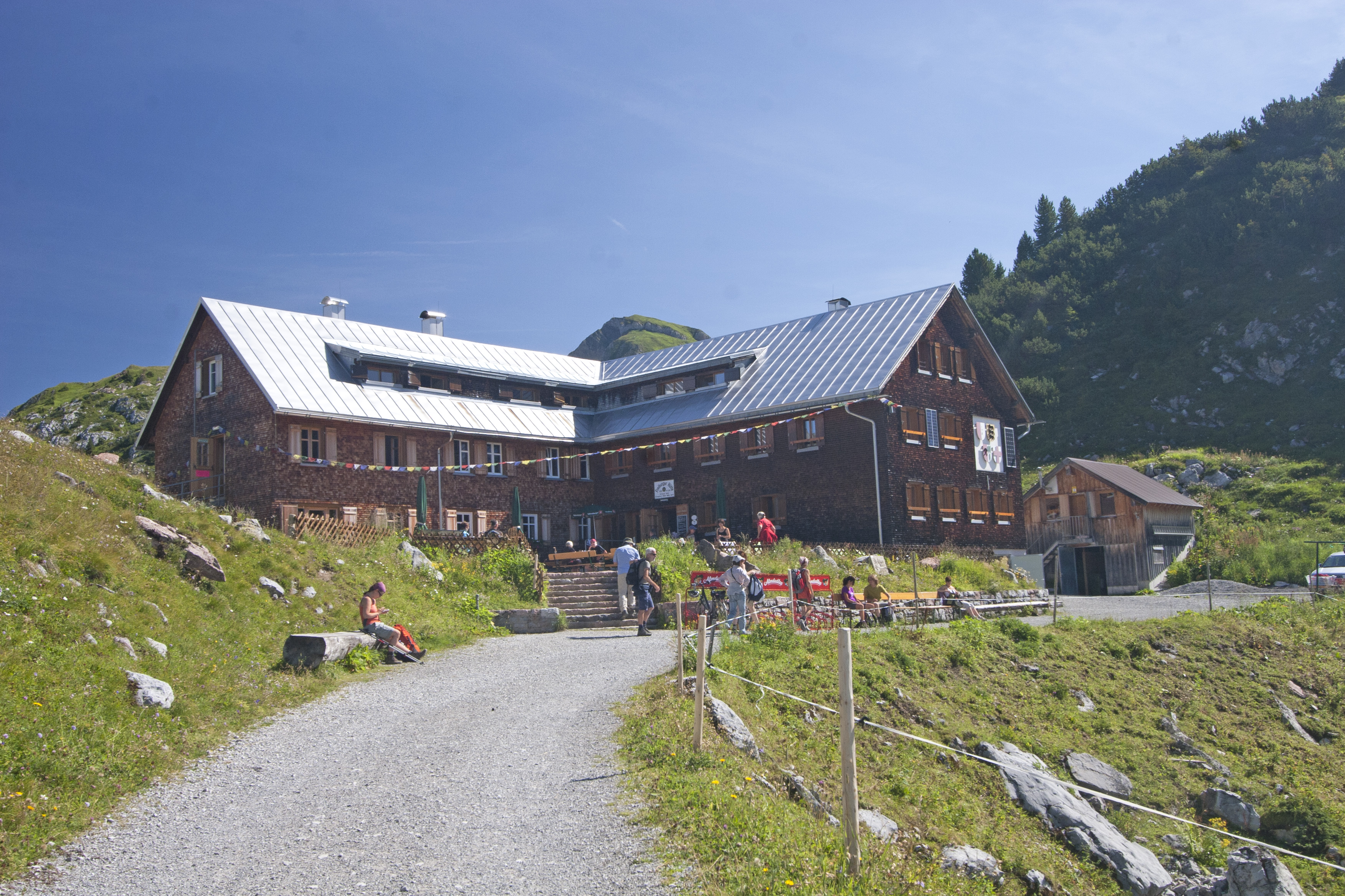 Freiburger Hütte im August 2013 mit dem Formaletsch (2292 m) darüber. Die Hütte rechts enthält den Winterraum im 1. Stock.